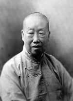 吳昌碩晚年的老照片,已過50年 来自